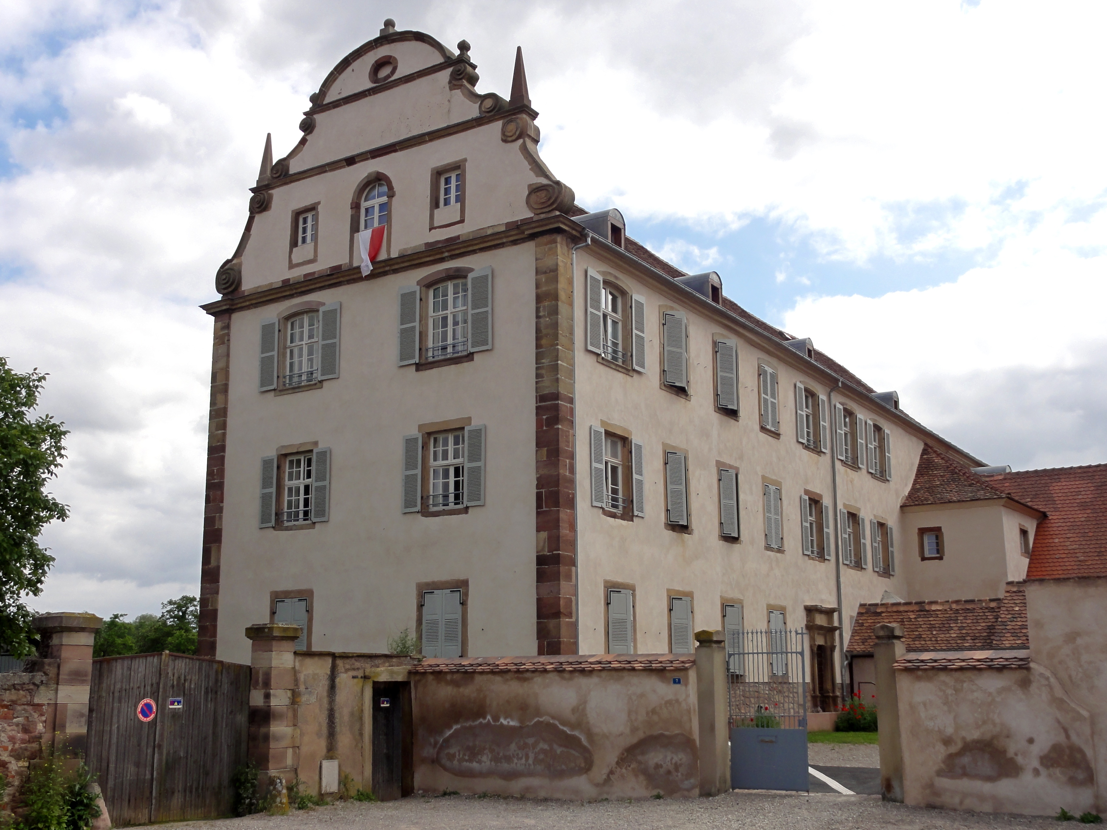 Alsace, Bas-Rhin, Altorf, Ancien logis abbatial (XVIIIe), 6 place Saint-Cyriaque (PA00084581, IA67011109).